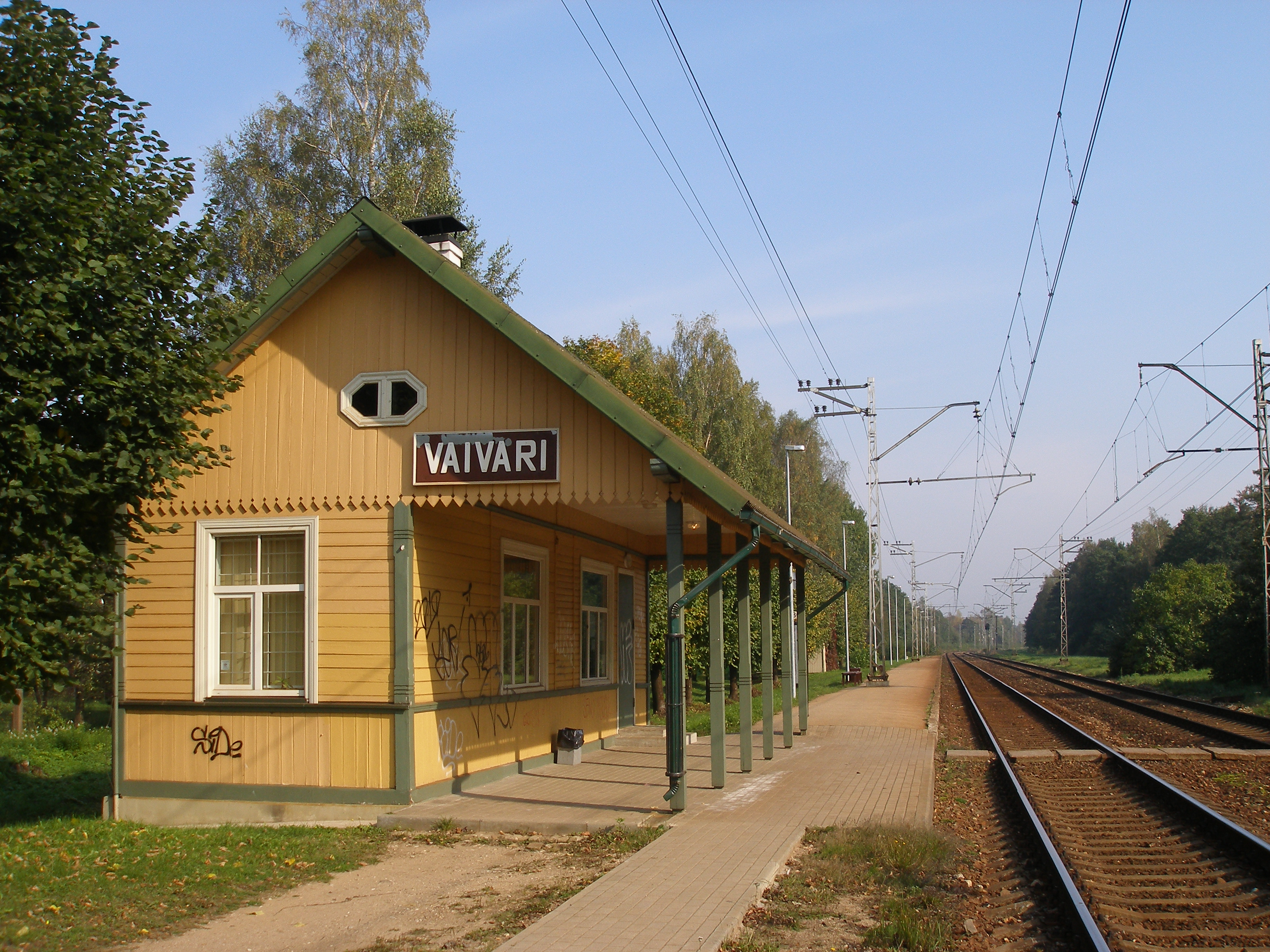 Vaivaru stacijas ēka un perons.